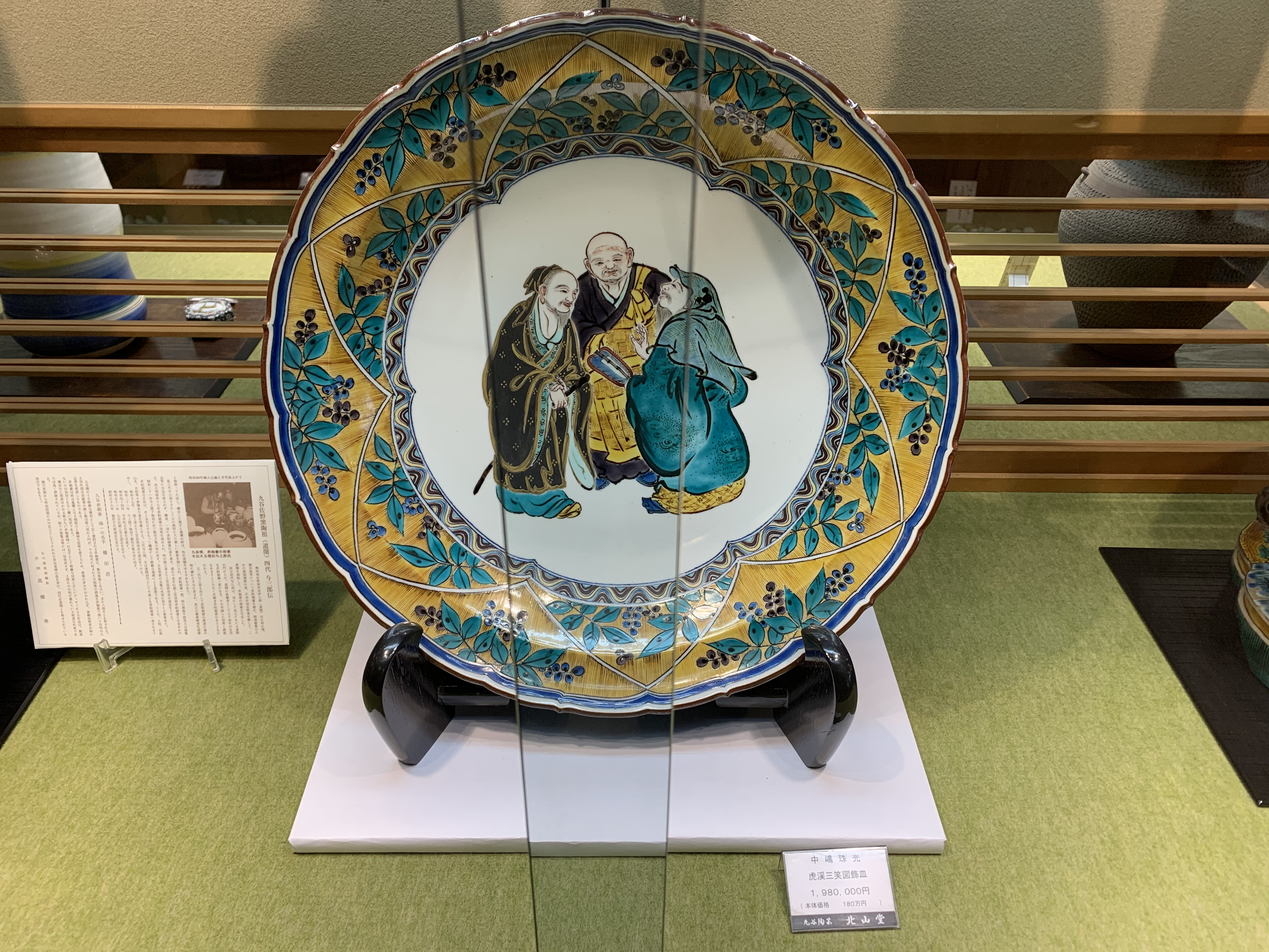 虎溪三笑圖九谷燒盤。